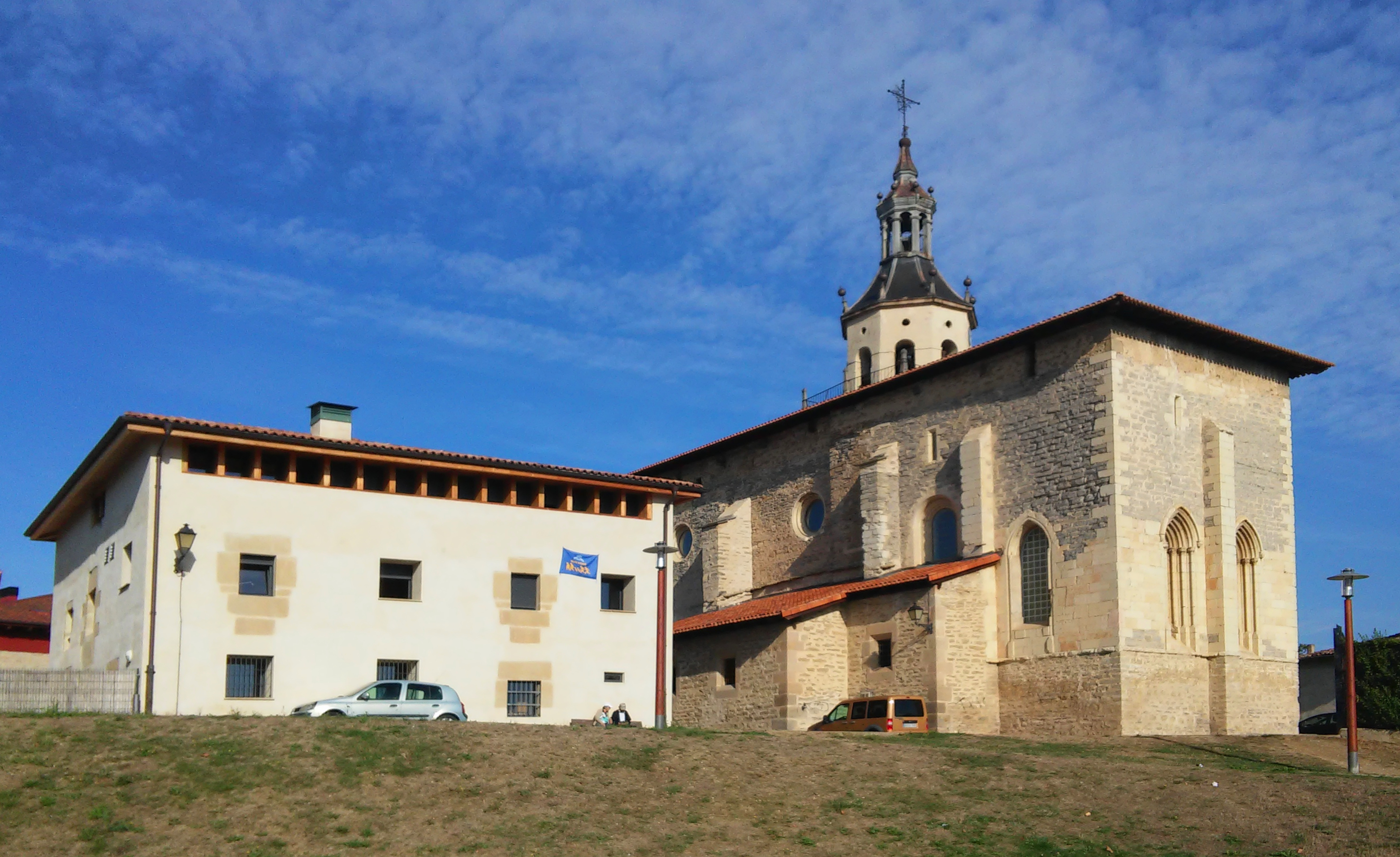 Ehari herriko eliza (Gasteiz)